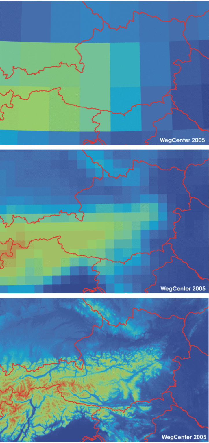 Grafiken der Forschungsgruppe Reloclim